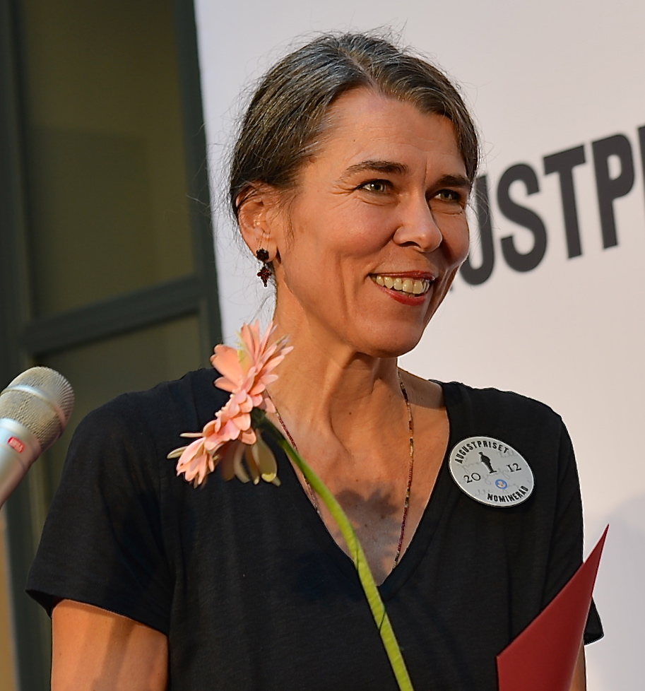 Cilla Naumann, Augustprisnominerad 2012